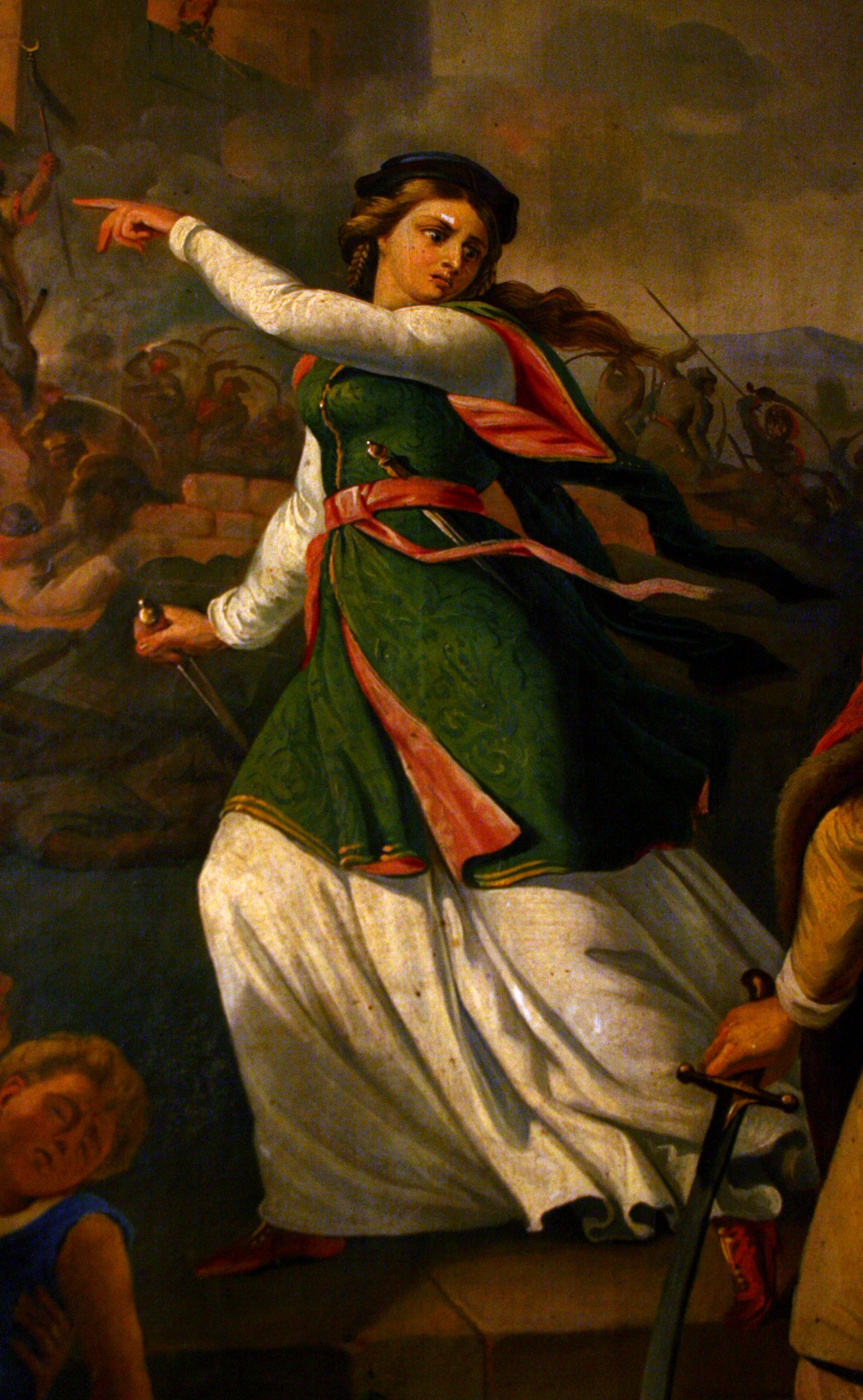 Postać Anny Doroty Chrzanowskiej na obrazie "Obrona Trembowli" autorstwa Aleksandra Lessera, obraz znajduje się w Muzeum Diecezjalnym w Sandomierzu.